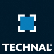 Logo Technal